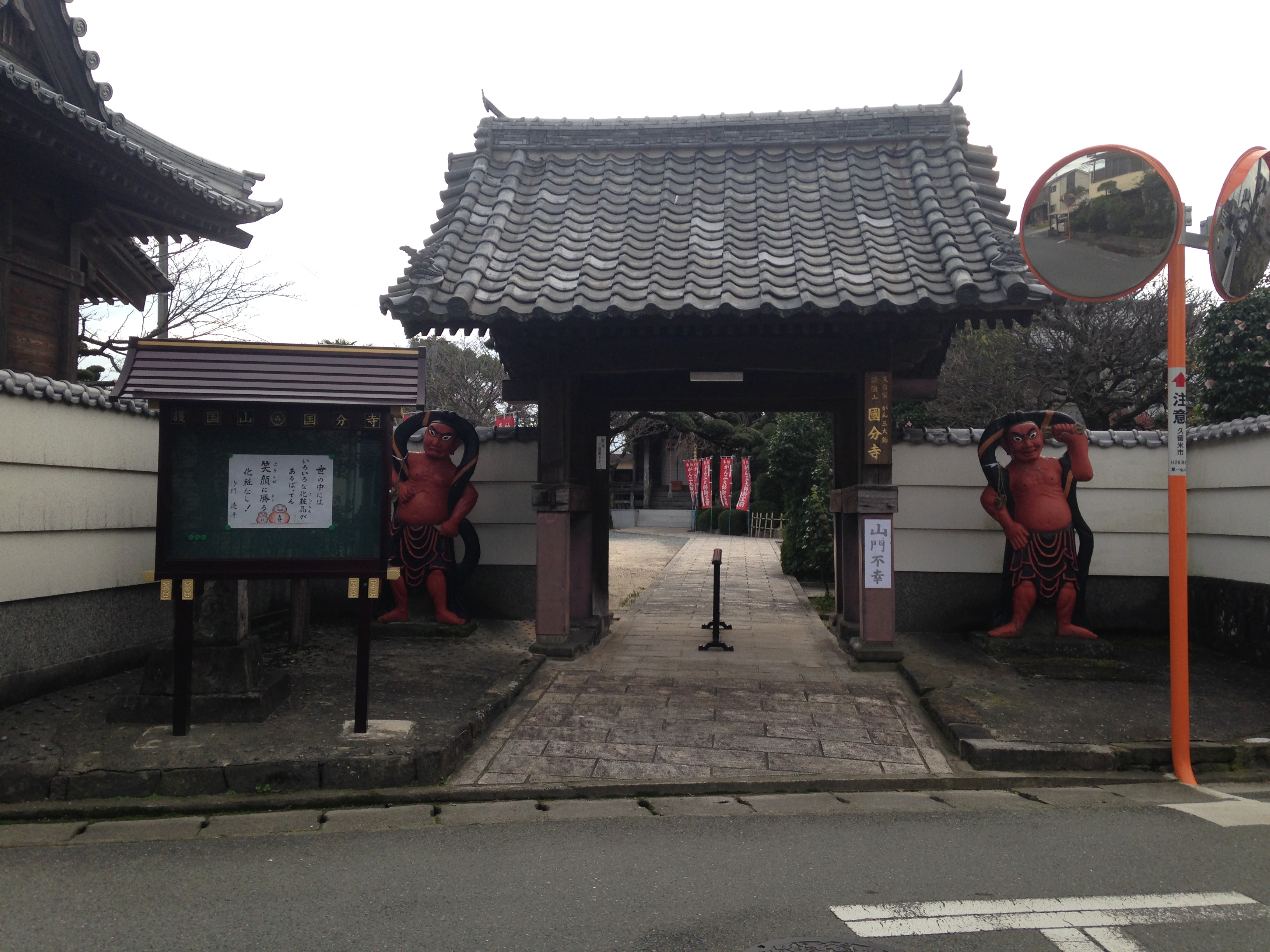 福岡県久留米市・国分寺の山門